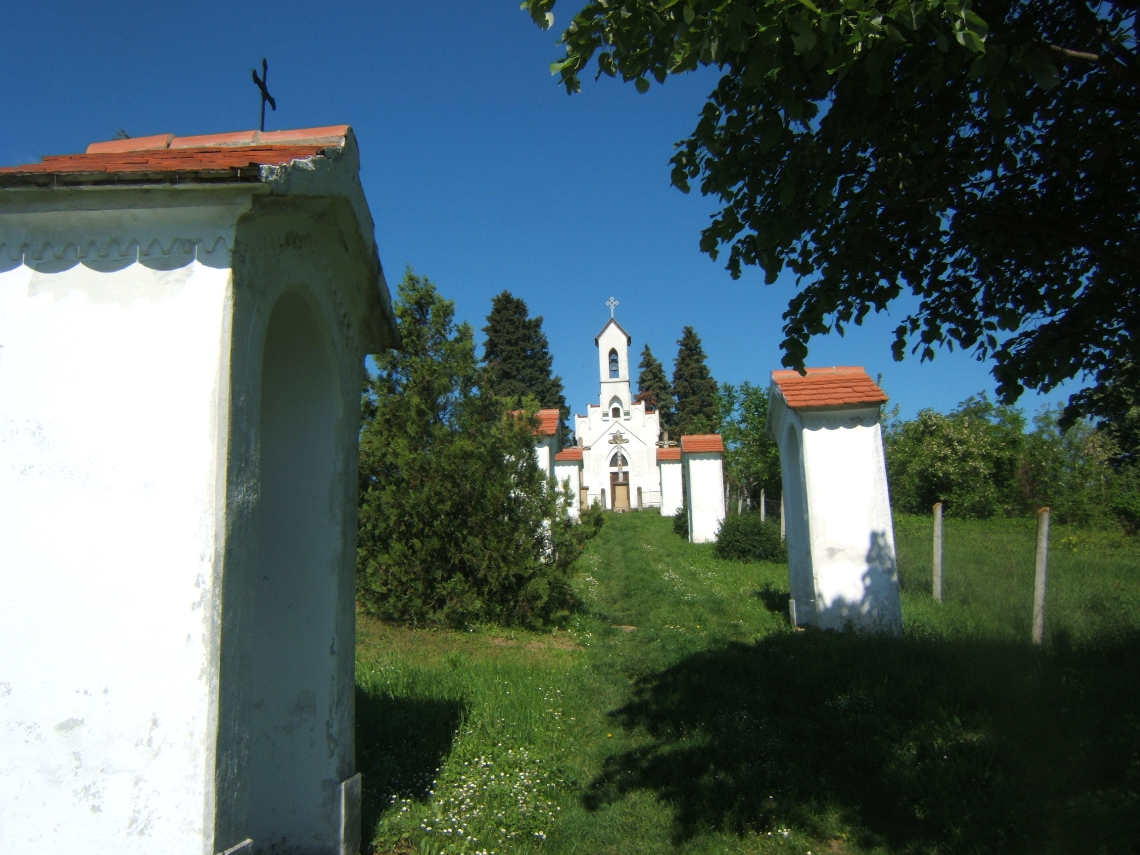 Műemléki védettségű kálvária és kápolna, azonosító: 7978 törzsszám: 10588 a Somogy vármegyei Lad temetőjében.